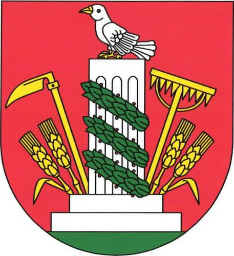 Znak, Chodovlice, okres Litoměřice